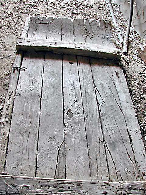 Trillo español, vista superior